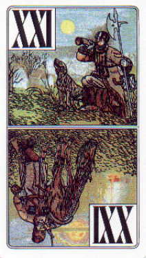 Smrekarjev tarok - mond